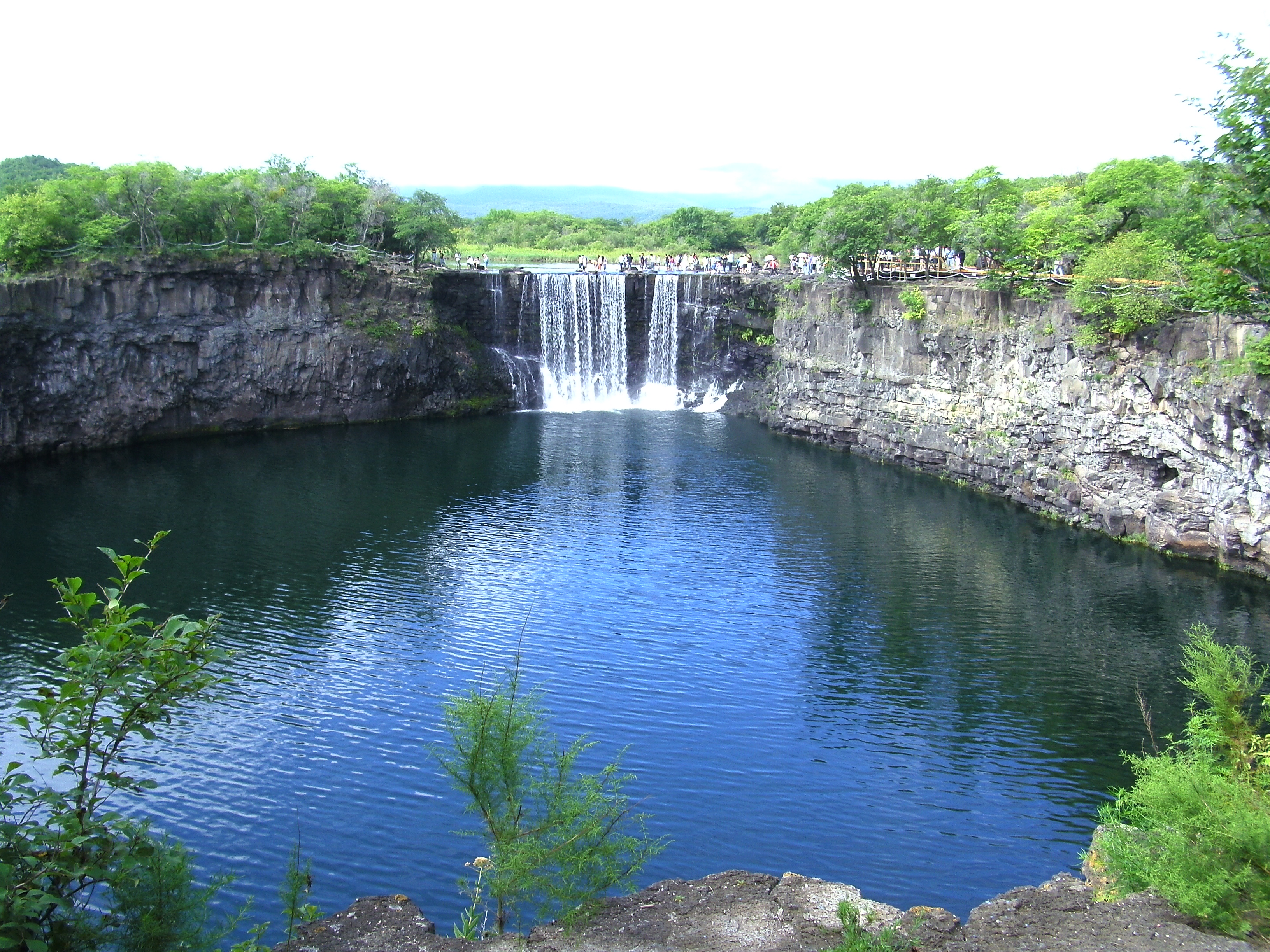 鏡泊湖の滝